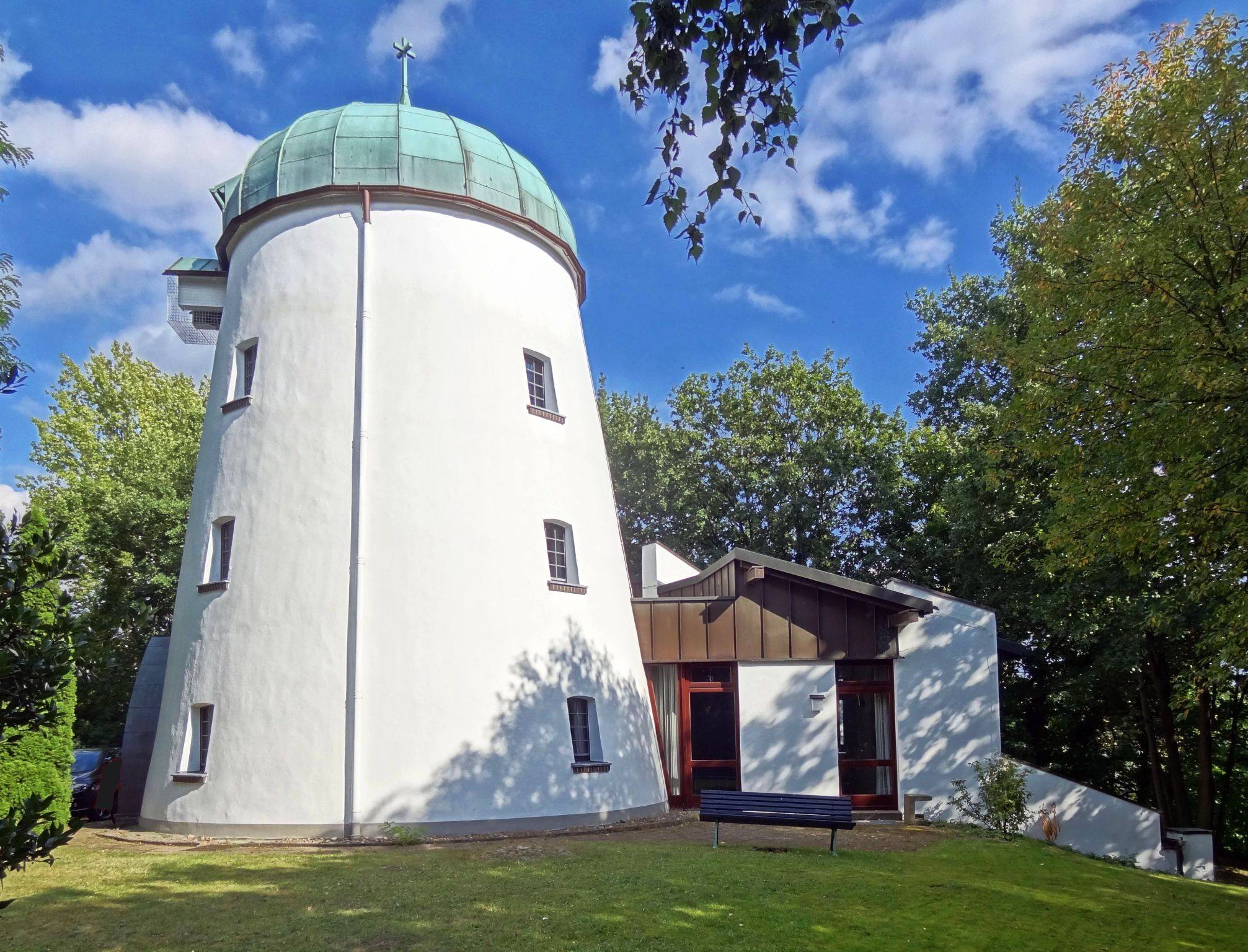 Mühlenkirche in Braunschweig-Veltenhof, Pfälzerstraße 39